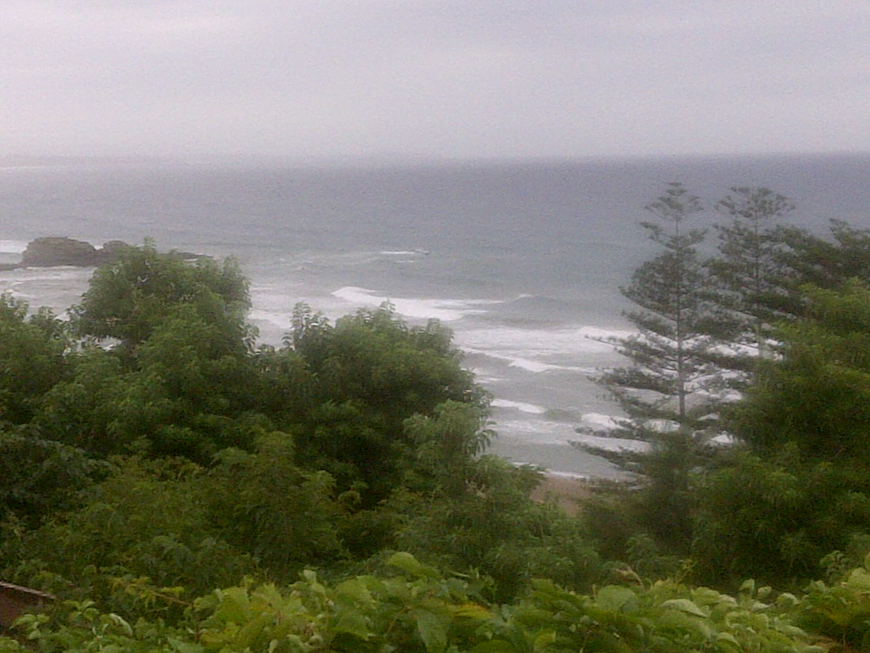 Photo prise à Figuier une plage a Boumerdes en Algérie